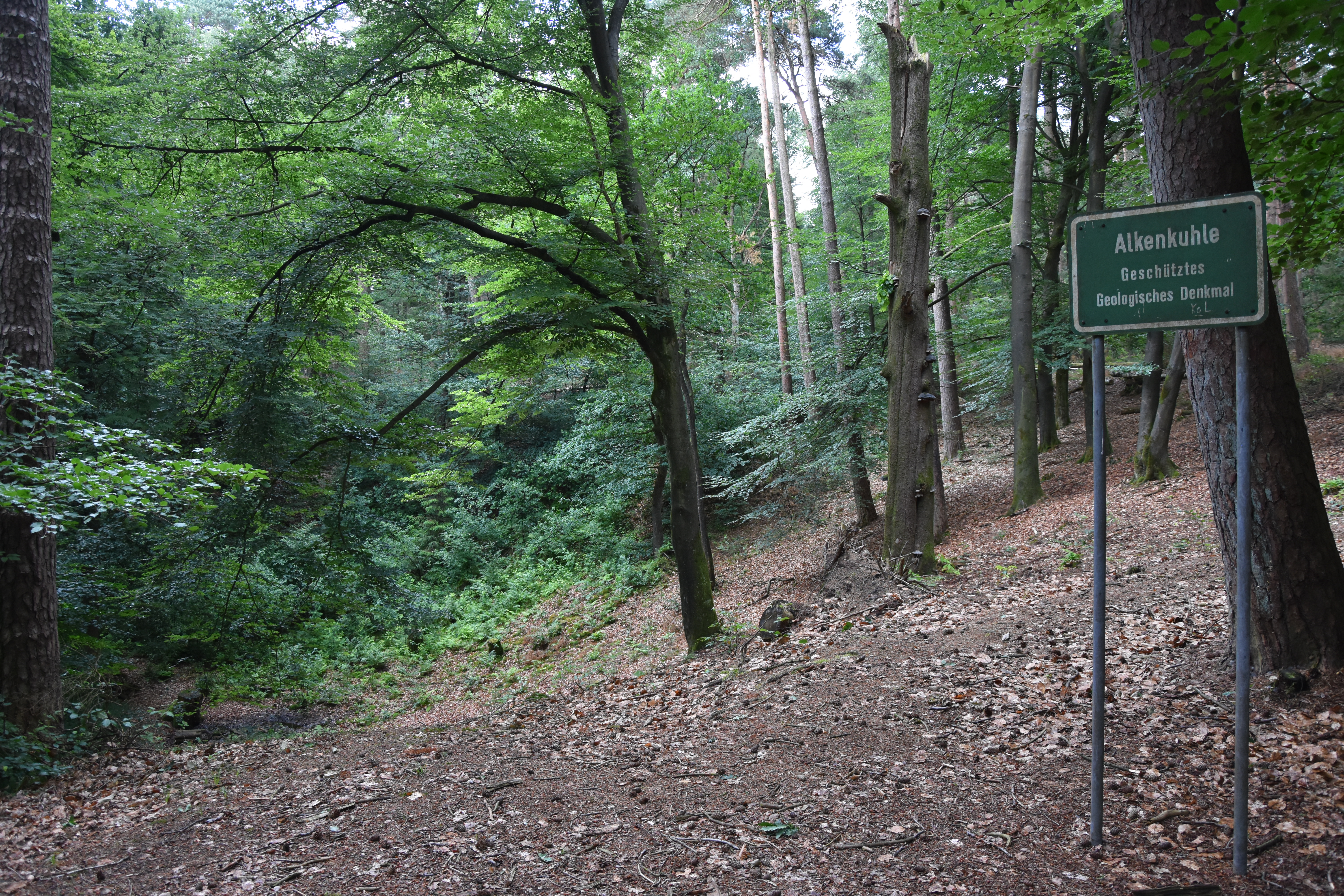 Das Toteisloch Alkenkuhle. Naturdenkmal im Wald zwischen Alfhausen und Ankum.